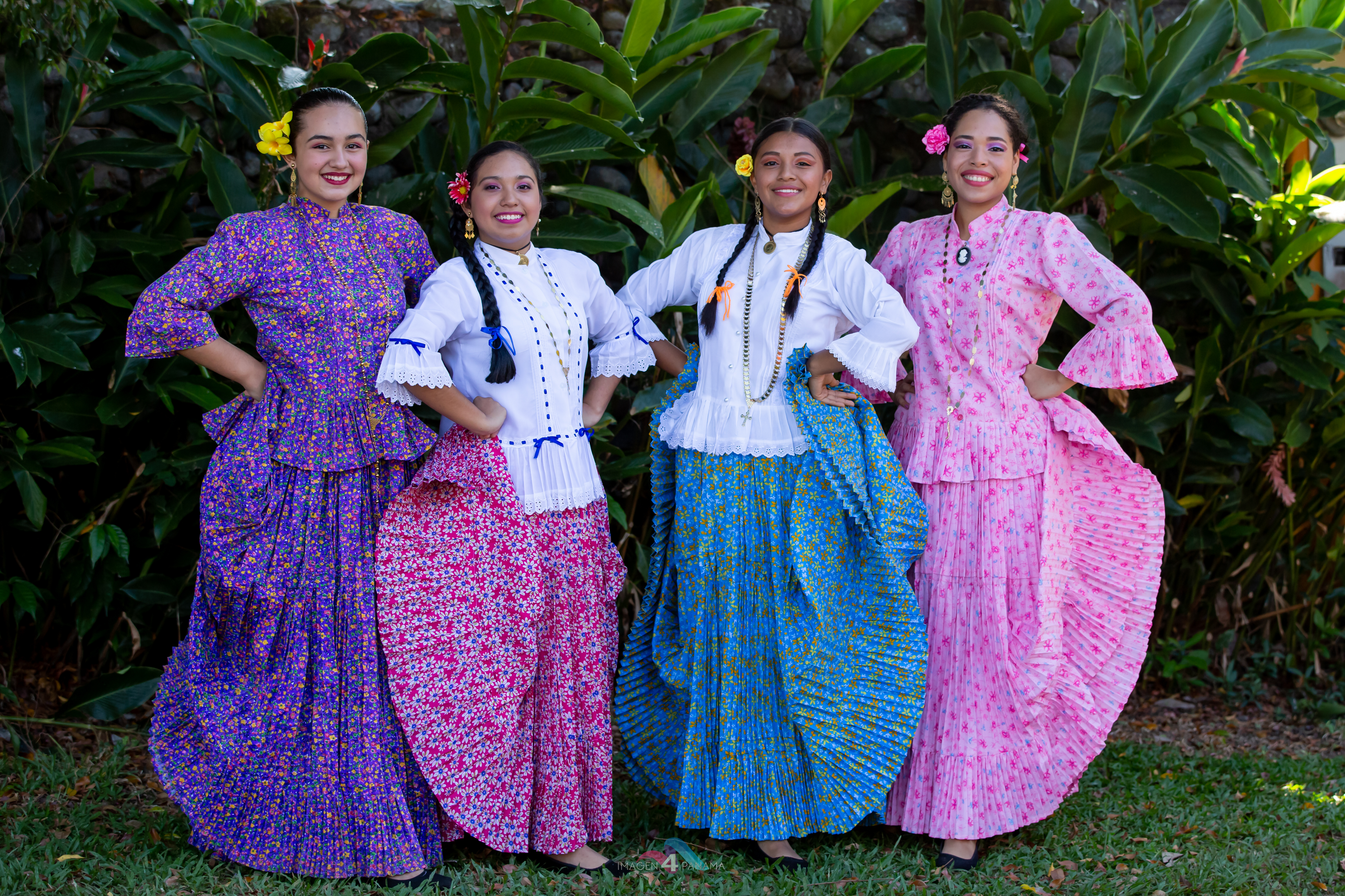 Variantes de indumentarias chiricanas